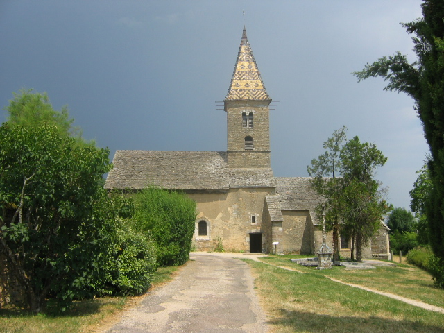 Eglise du hameau de Fixey, près de Fixin, Bourgogne, France.